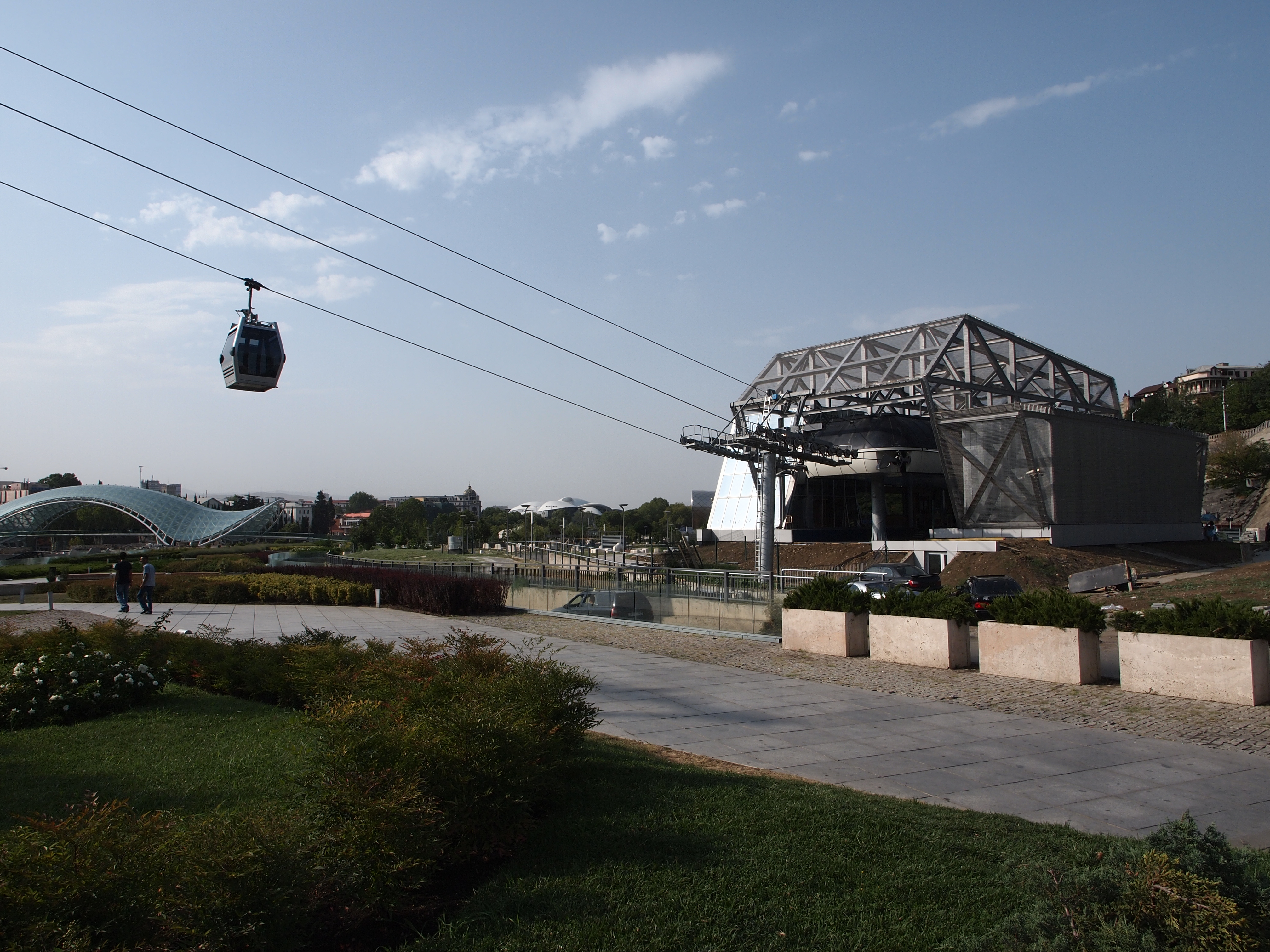 Dzveli Tbilisi, Tbilisi, Georgia